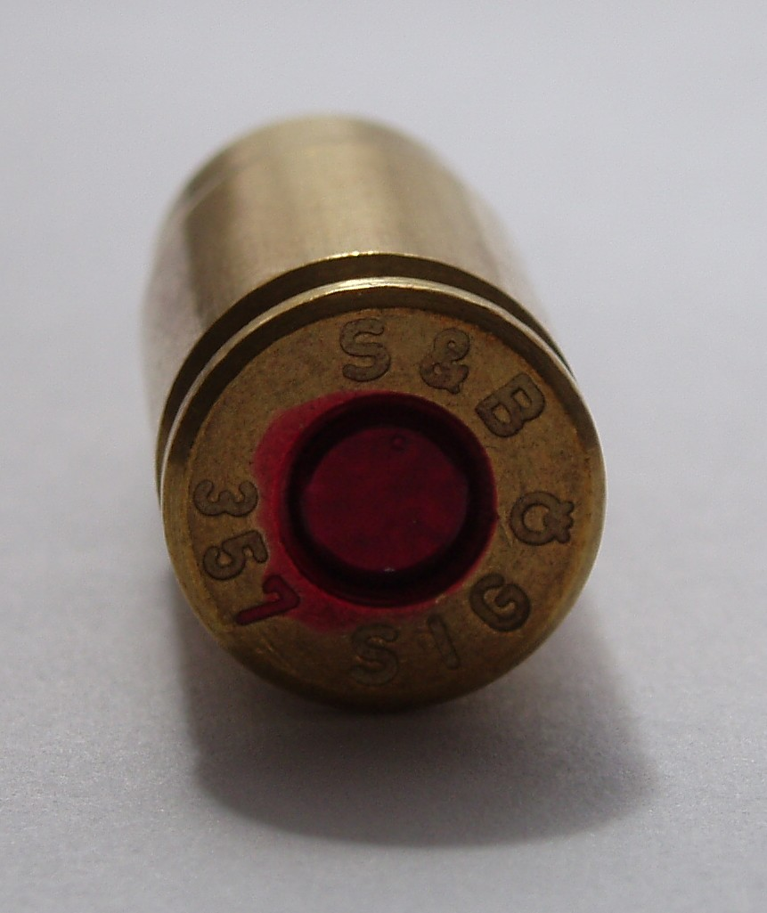 .357 SIG pistol cartrdige. FMJ bullet. Manufacturer: Sellier & Bellot.